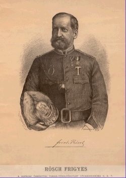 der deutsch-ungarische Lehrer und Feuerwehrpionier Friedrich Rösch (1823-1923)